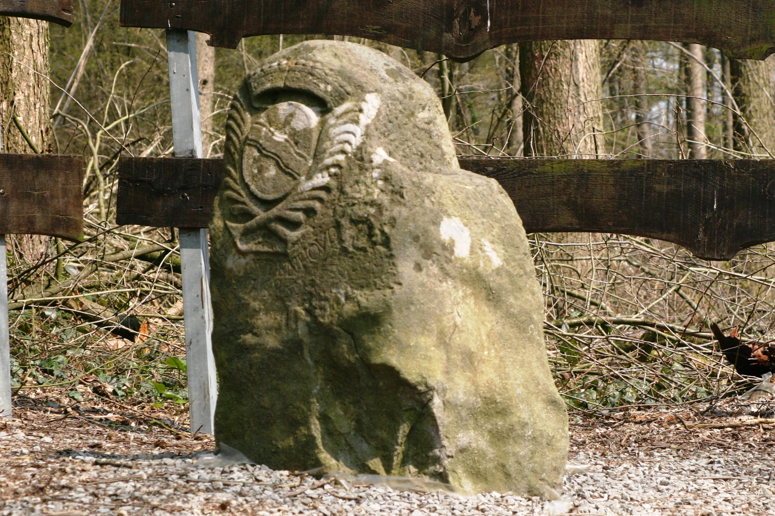 D'Grenzmaark Le Bénitier tëscht Houchenée a Fraiture.